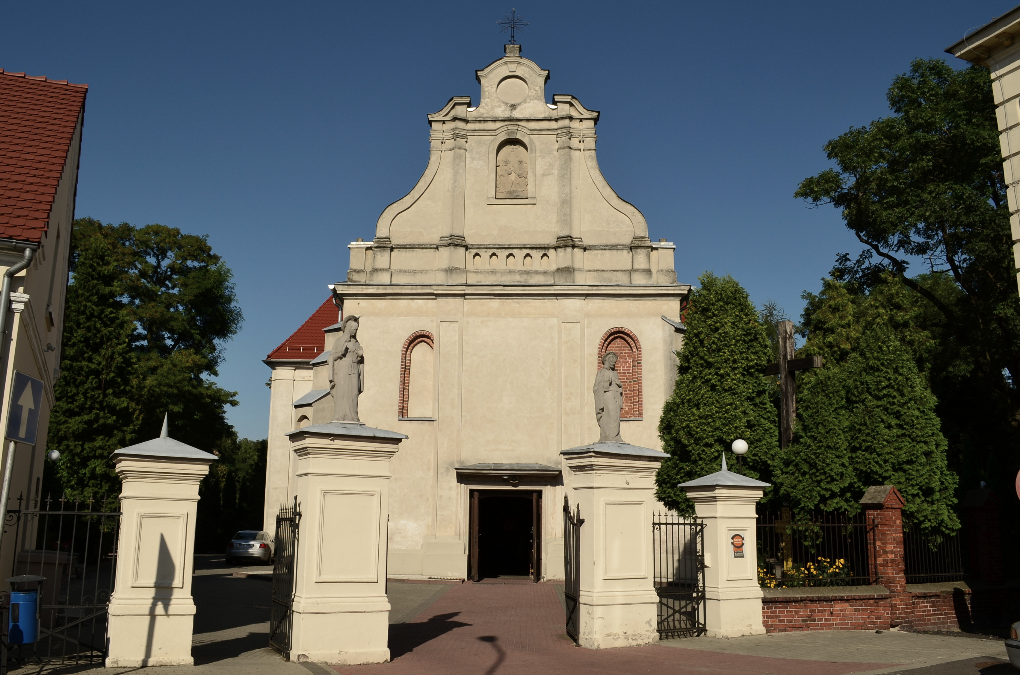 Stęszew - kościół parafialny p.w. Św. Trójcy, 2 poł. XV, XVIII, 1937